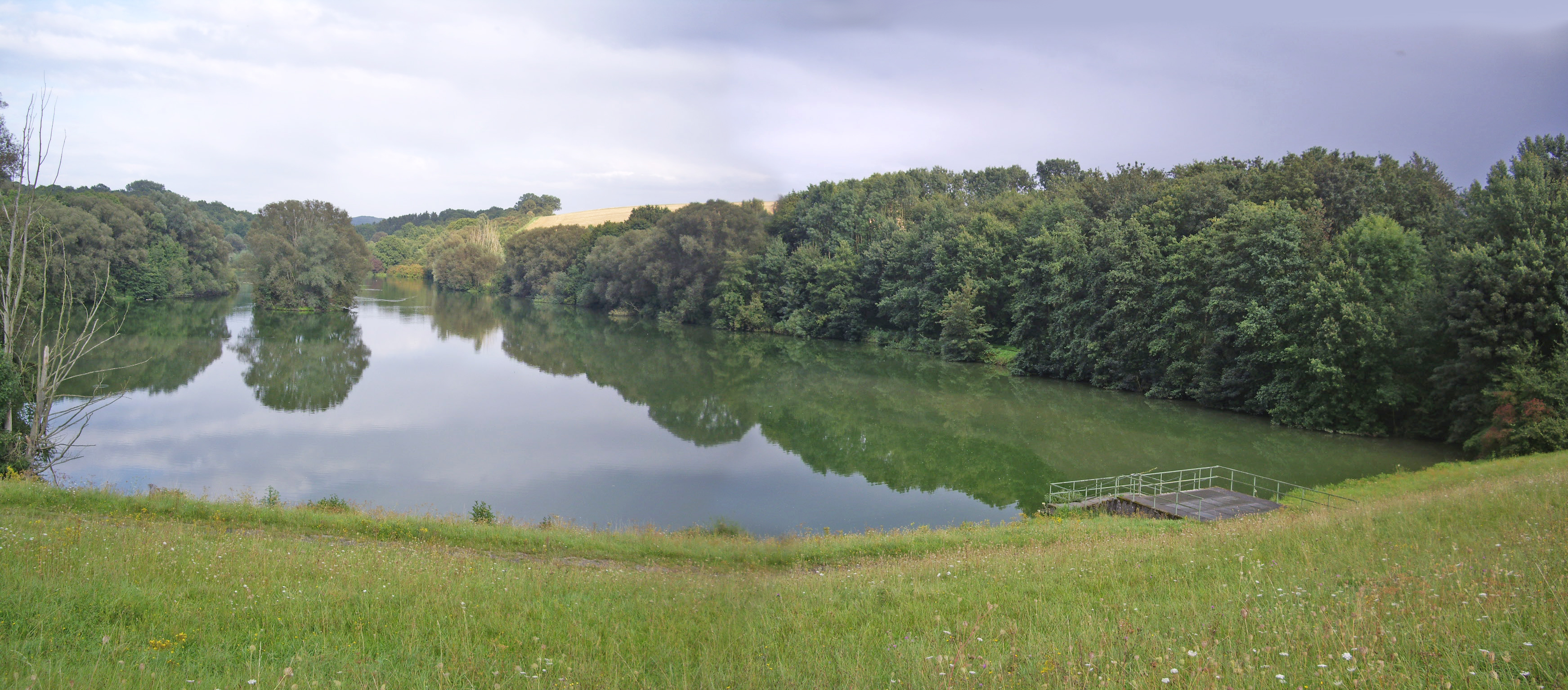 Wendebachstausee bei Göttingen, Blick vom Staudamm auf den See, 23.8.2014. Foto: F. Welter-Schultes